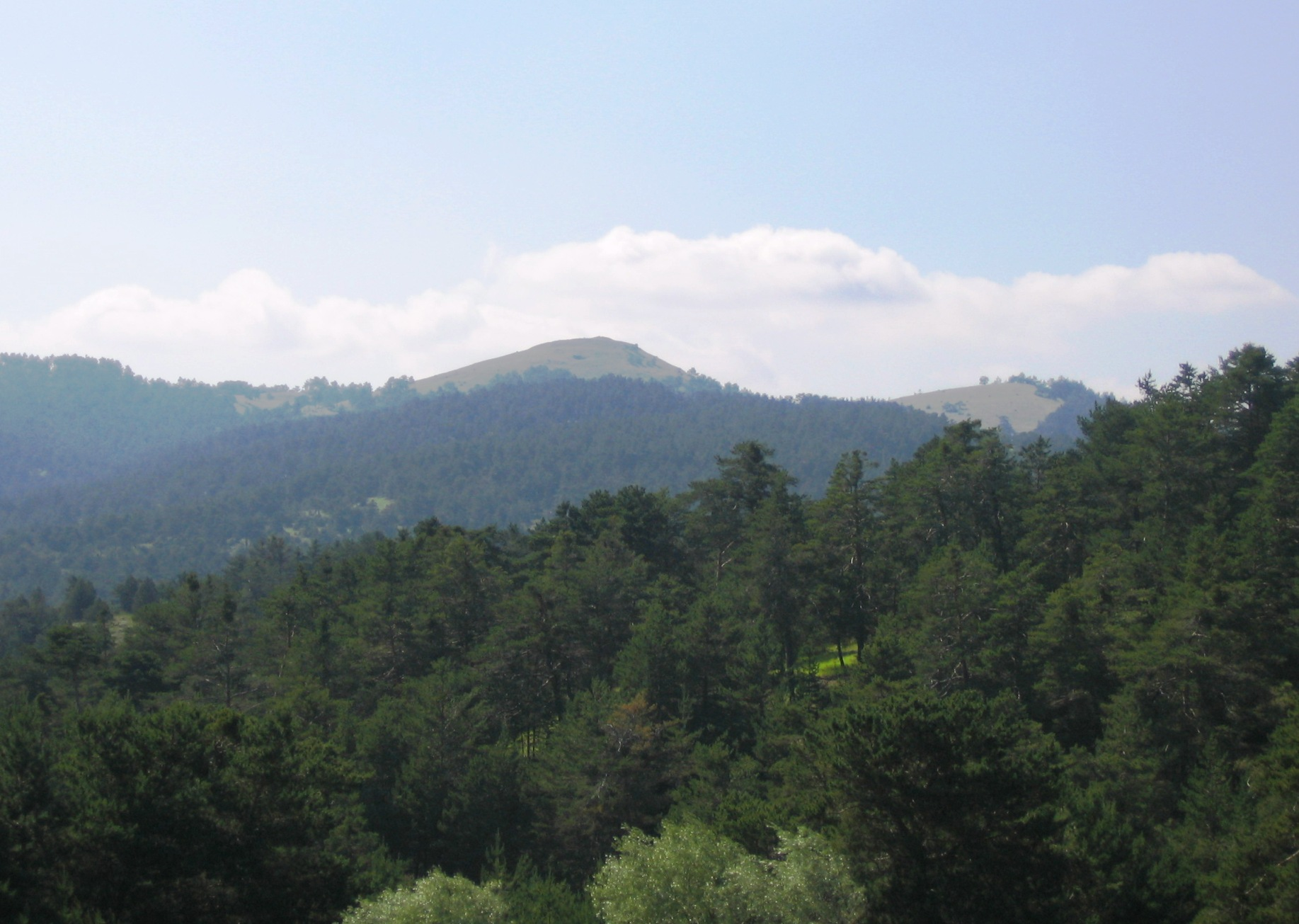 Karlıyurt